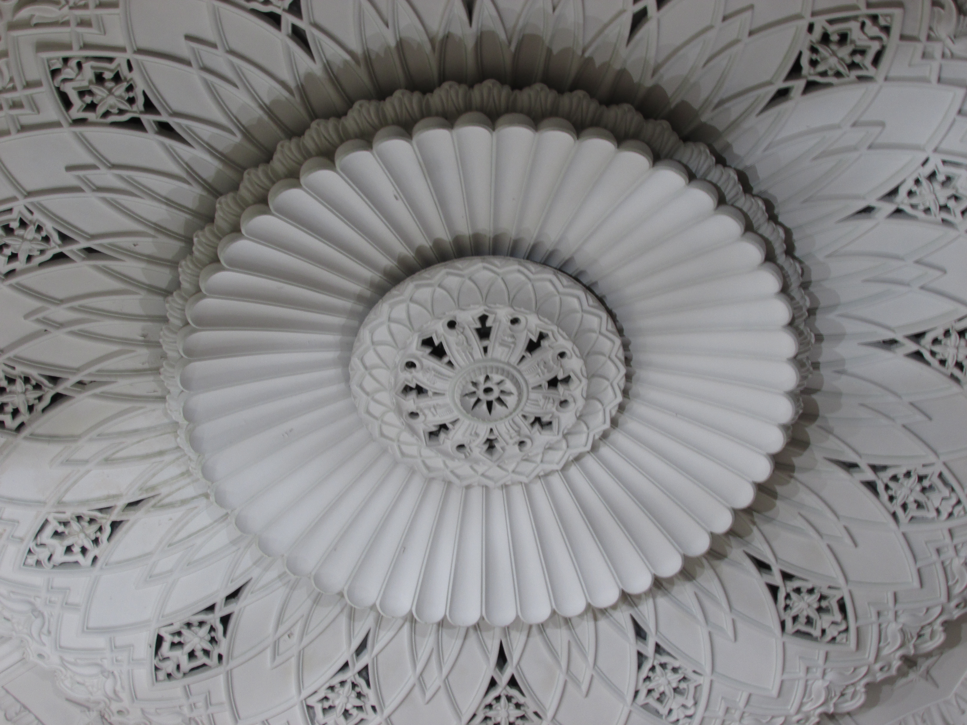 Detalhe do teto do antigo cinema. Apesar de não apresentar suas cores e organização interna originais, o interior do prédio apresenta sua estrutura muito bem conservada.